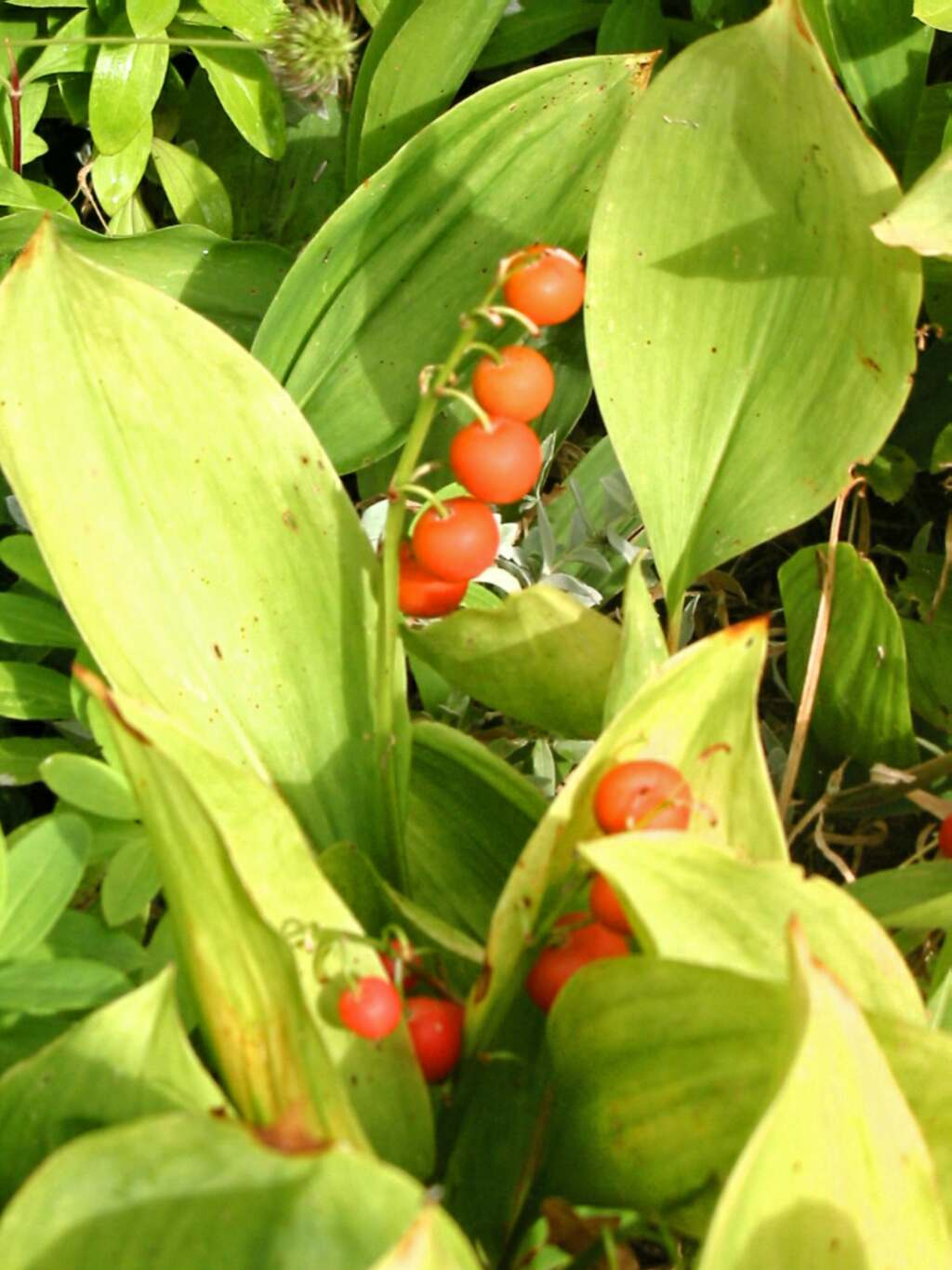 Baies de muguet Photo JH Mora, août 2005